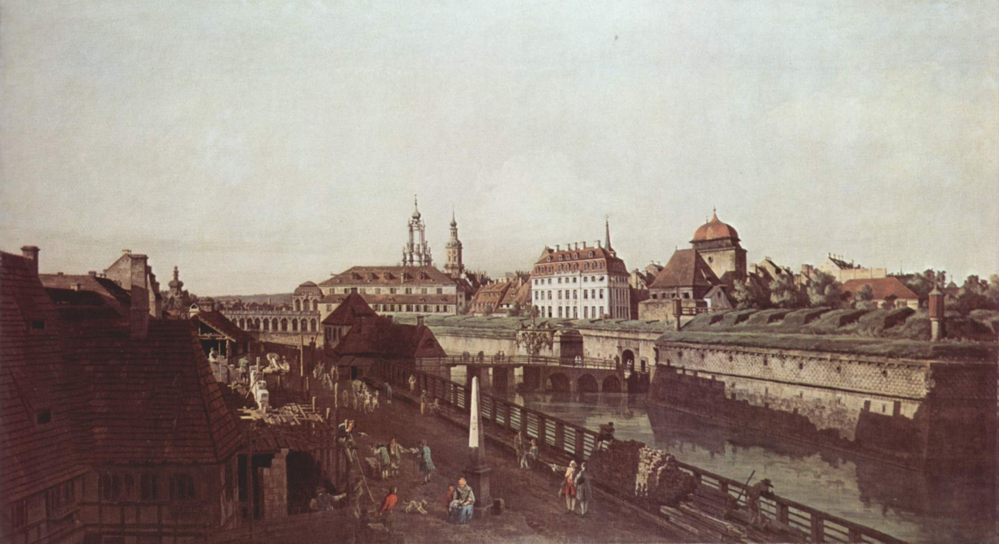 Blick vom Südwesten auf den Wilsdruffer Thorplatz (heutiger Postplatz), von dem eine Brücke den Wassergraben der Stadtbefestigung überspannt und zum Wilsdruffer Tor (rechts im Bild) führt. Die hintere Brücke ist die alte Augustusbrücke, die über die im Gemälde nicht sichtbare Elbe führt.